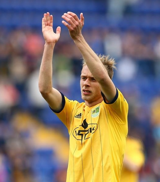 Сергей Болбат